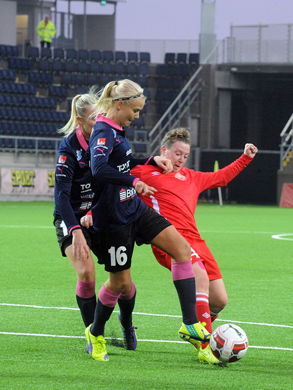 a_29_0262